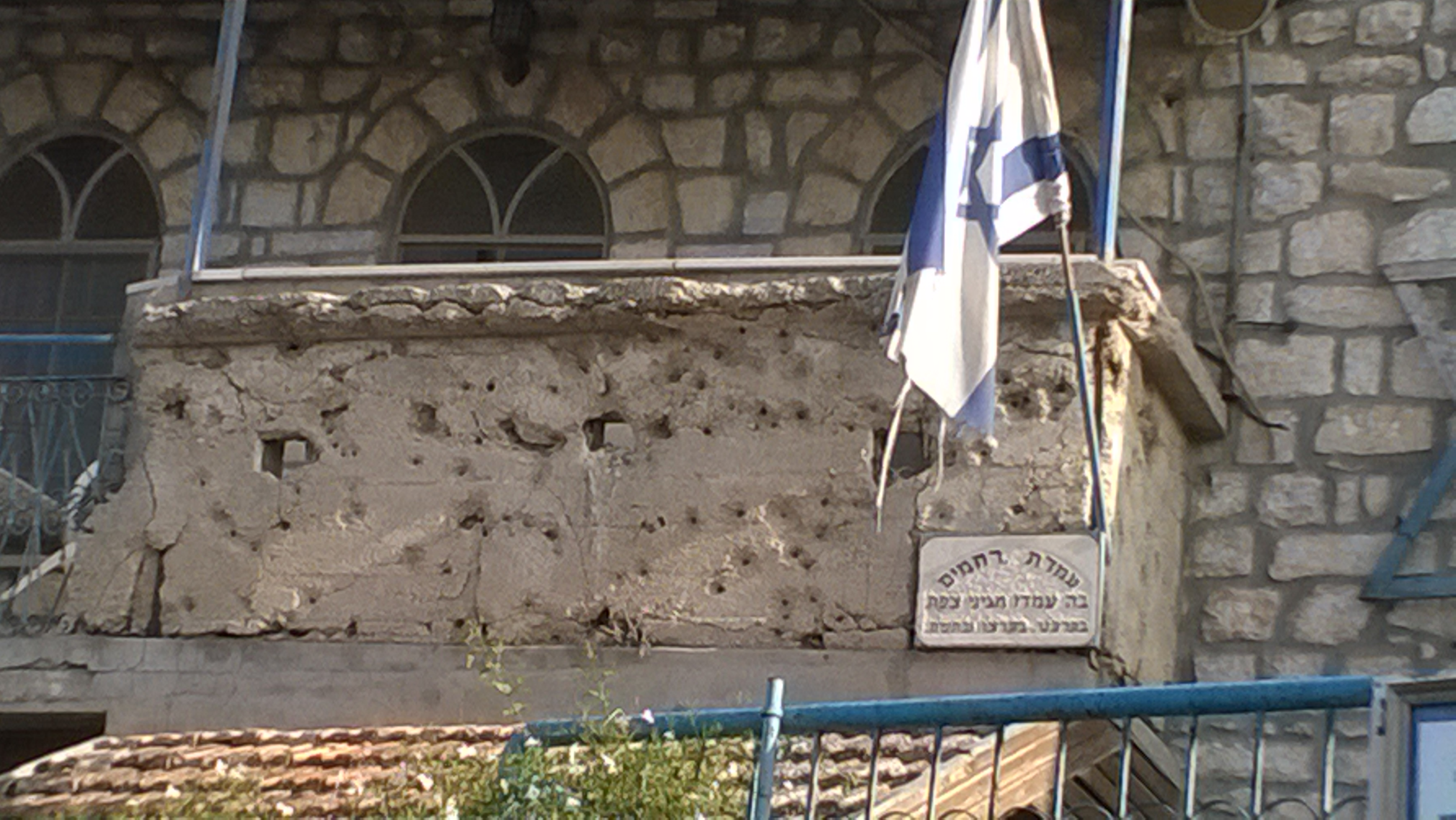 העיר העתיקה של צפת